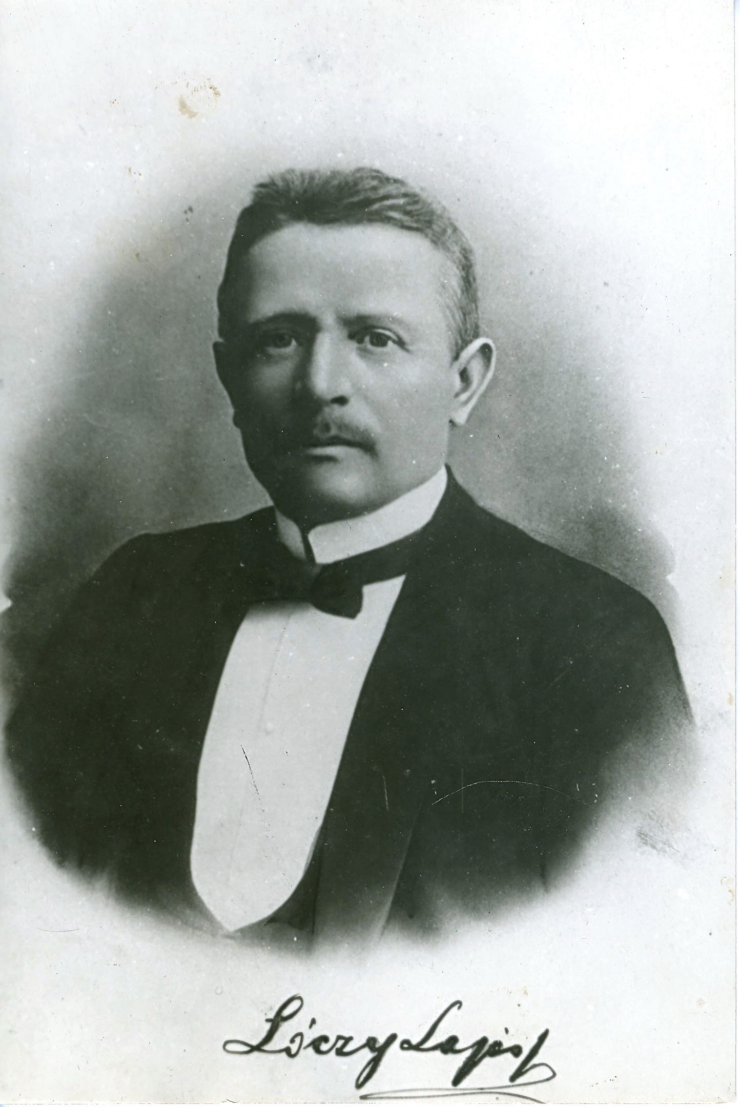 Lóczy Lajos (1849-1920) magyar geológus, geográfus, egyetemi tanár, a Magyar Tudományos Akadémia tagja. A magyar földtan és földrajz kiváló tudósa.